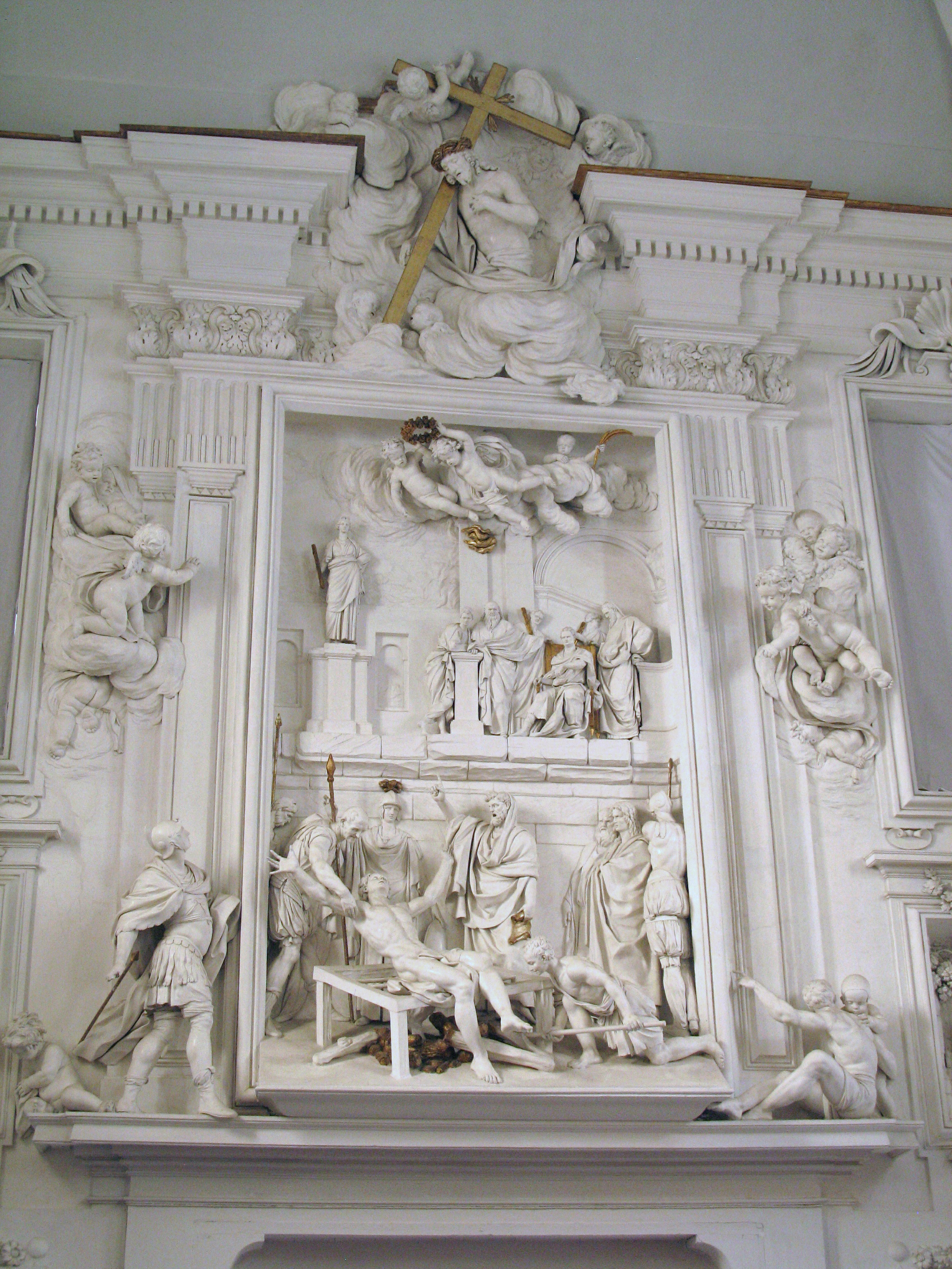 Martirio de San Lorenzo. Obra en estuco de Giacomo Serpotta en el Oratorio de San Lorenzo en Palermo.